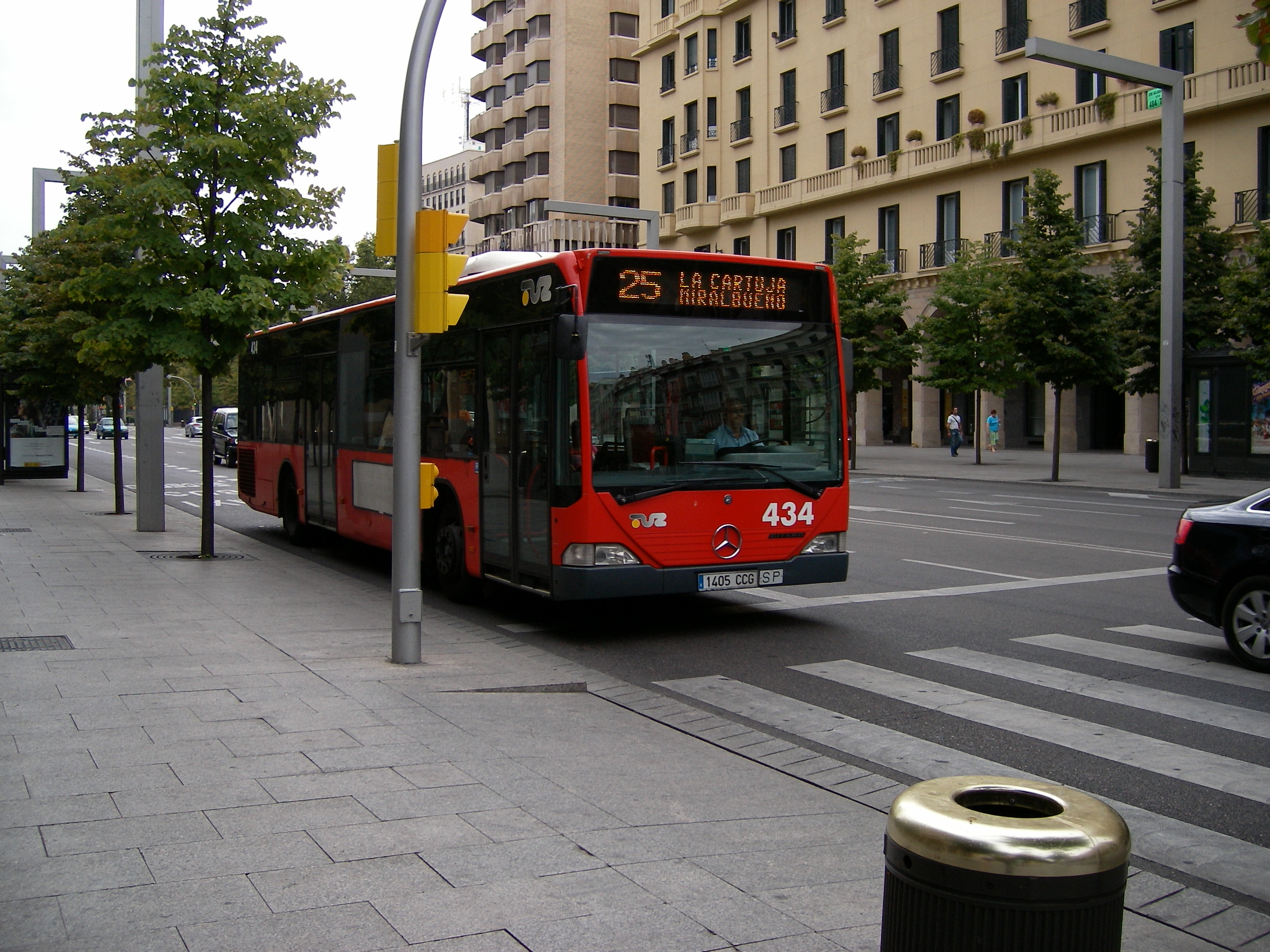 Autobús modelo Mercedes-Benz Citaro O-530 perteneciente a TUZSA, prestando servicio en Línea 25.